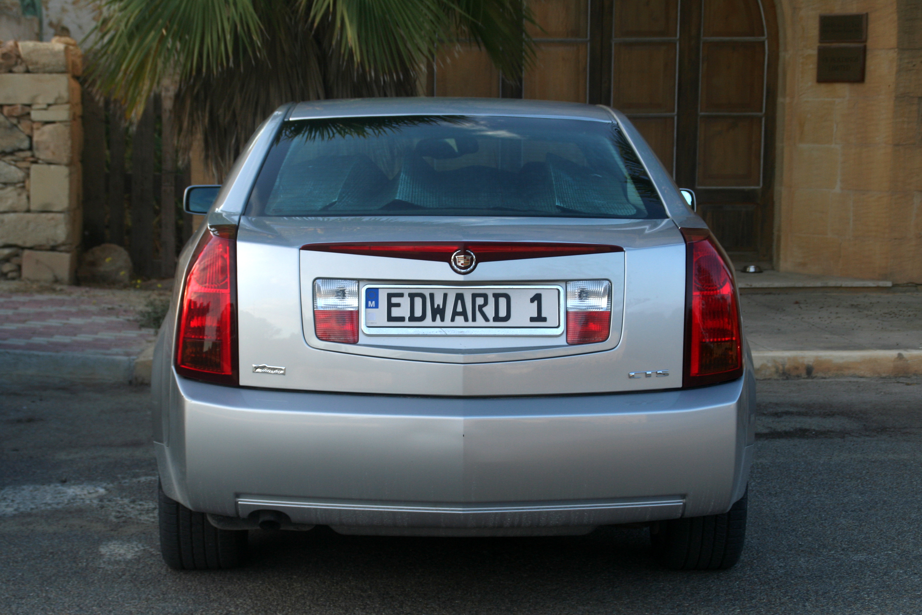 Immatriculation maltaise personnalisée au nom du propriétaire du véhicule